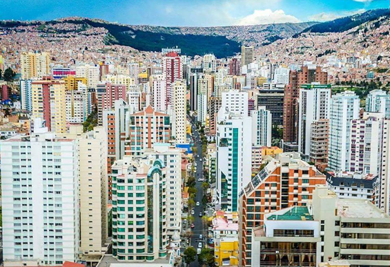 Edificios de Cotahuma